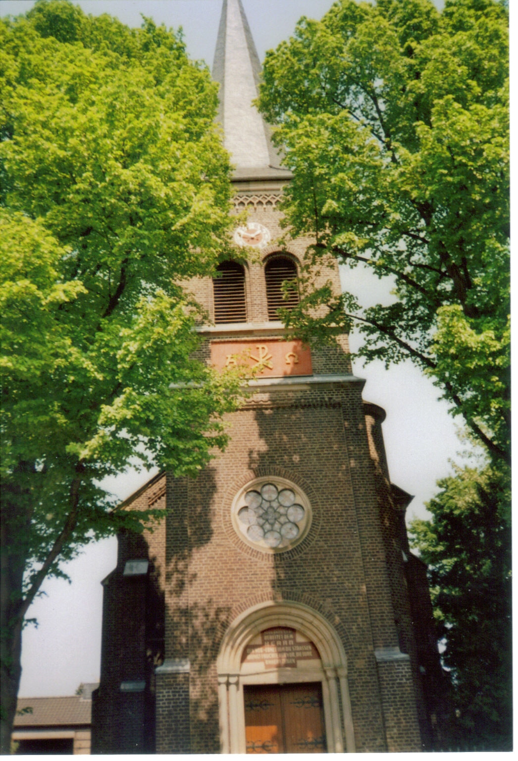 Köln-Thenhoven, Katholische Pfarrkirche St. Johann Baptist This is the photograph of an architectural monument. It is part of the list of cultural monuments of Köln, no. 1296